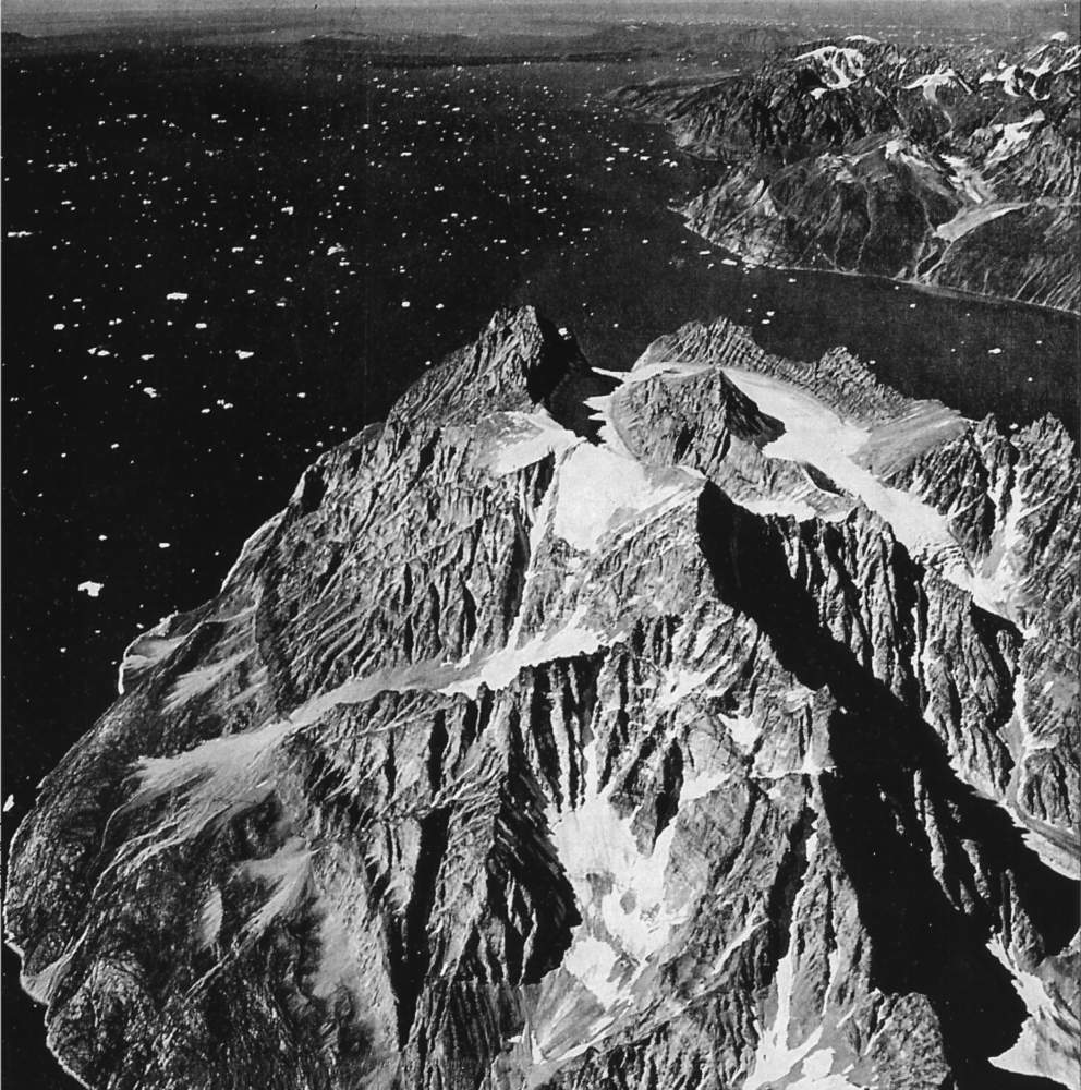 Sommet dominant la péninsule Wegener